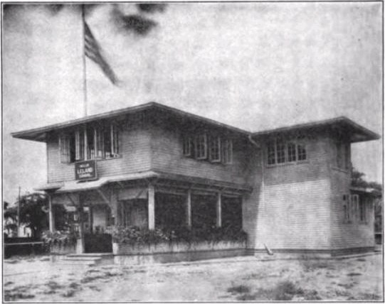 Nellie Leland School, Detroit Michigan